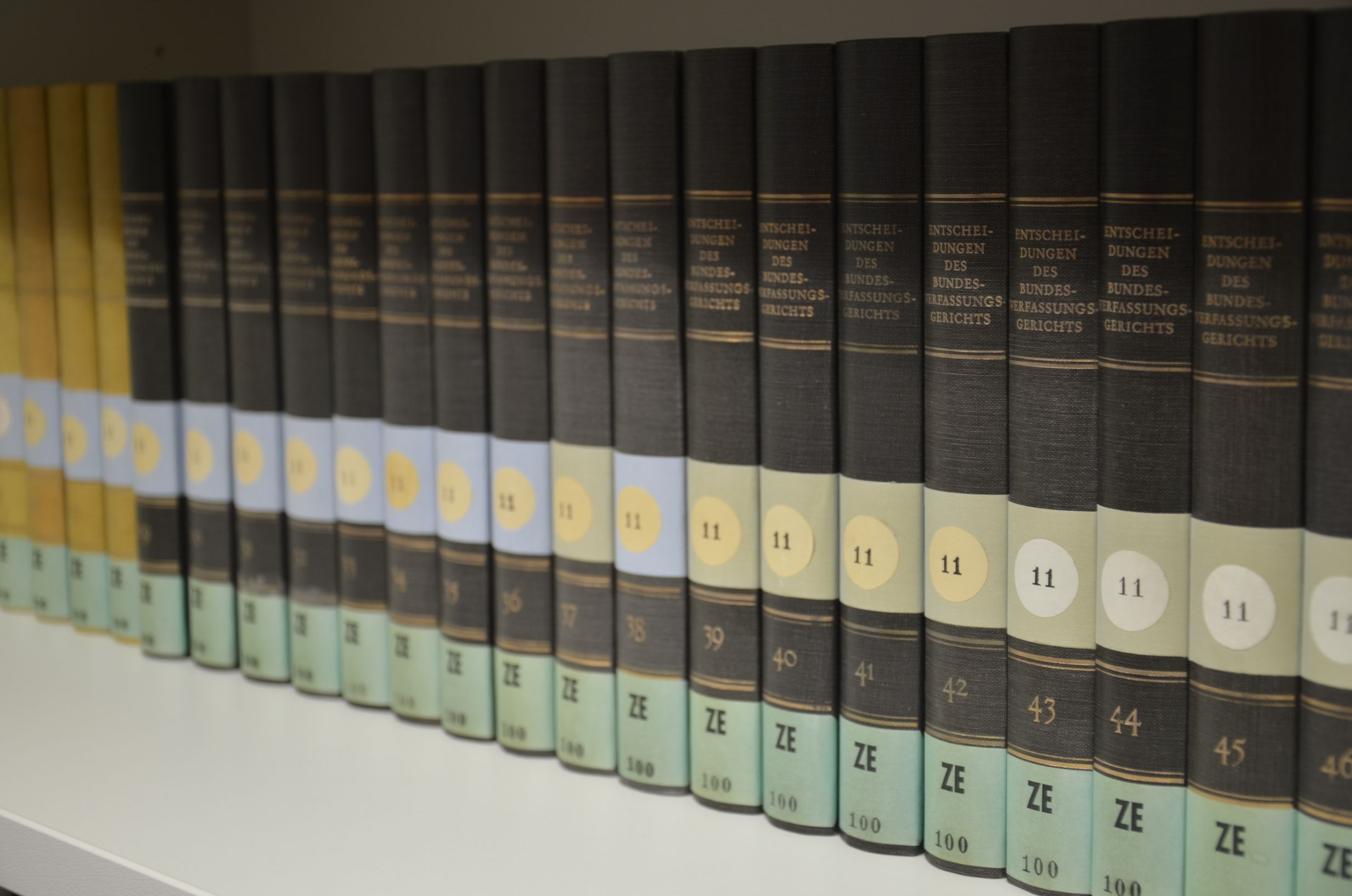 Exkursion von WikiCon-Teilnehmern zum Bundesverfassungsgericht, Dienstsitz Waldstadt; Entscheidungen des Bundesverfassungsgerichts als gebundene Bücher